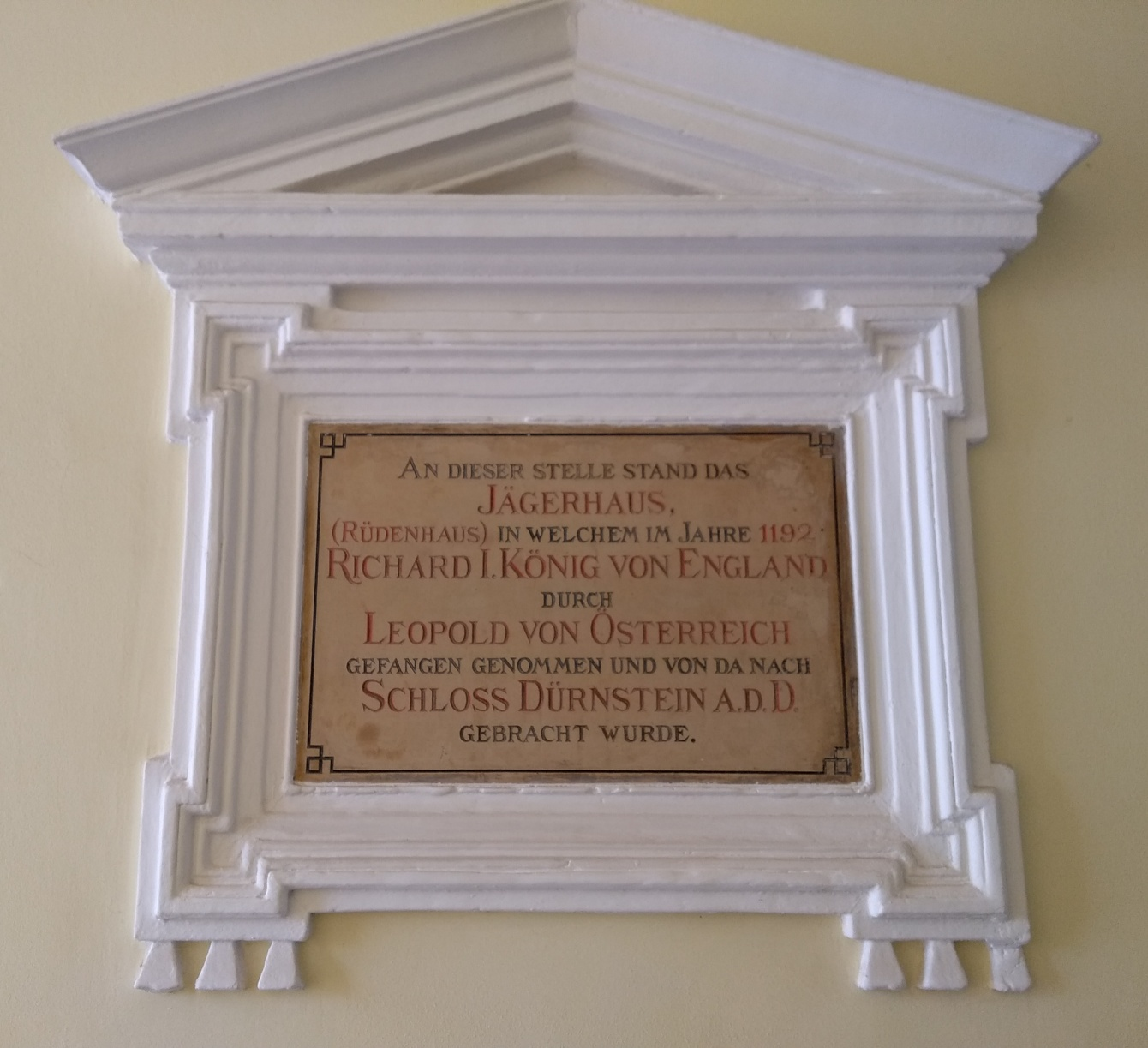 Gedenktafel Gefangennahme Richard Löwenherz, Erdbergstraße 41, 1030 Wien